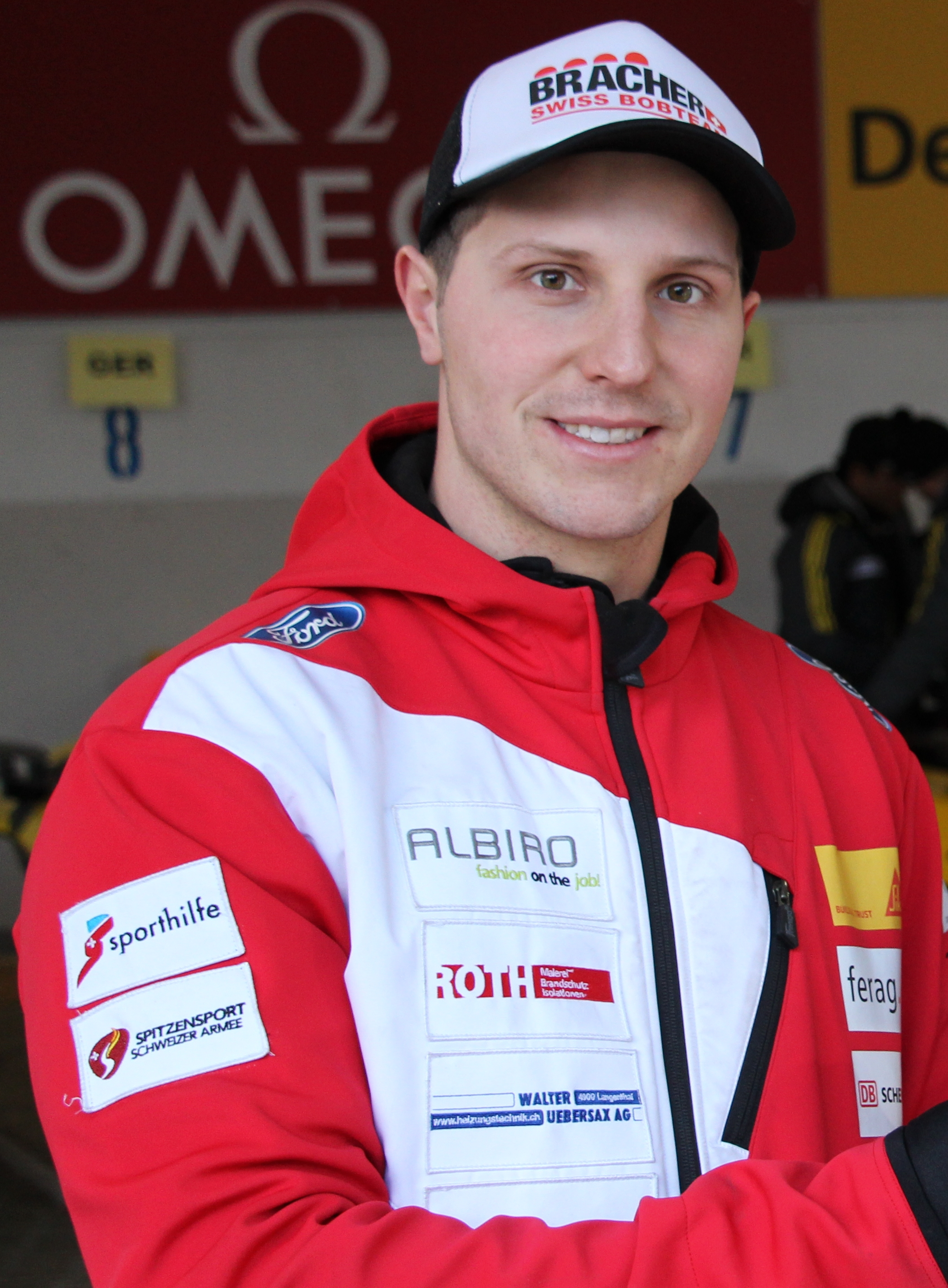 Königssee